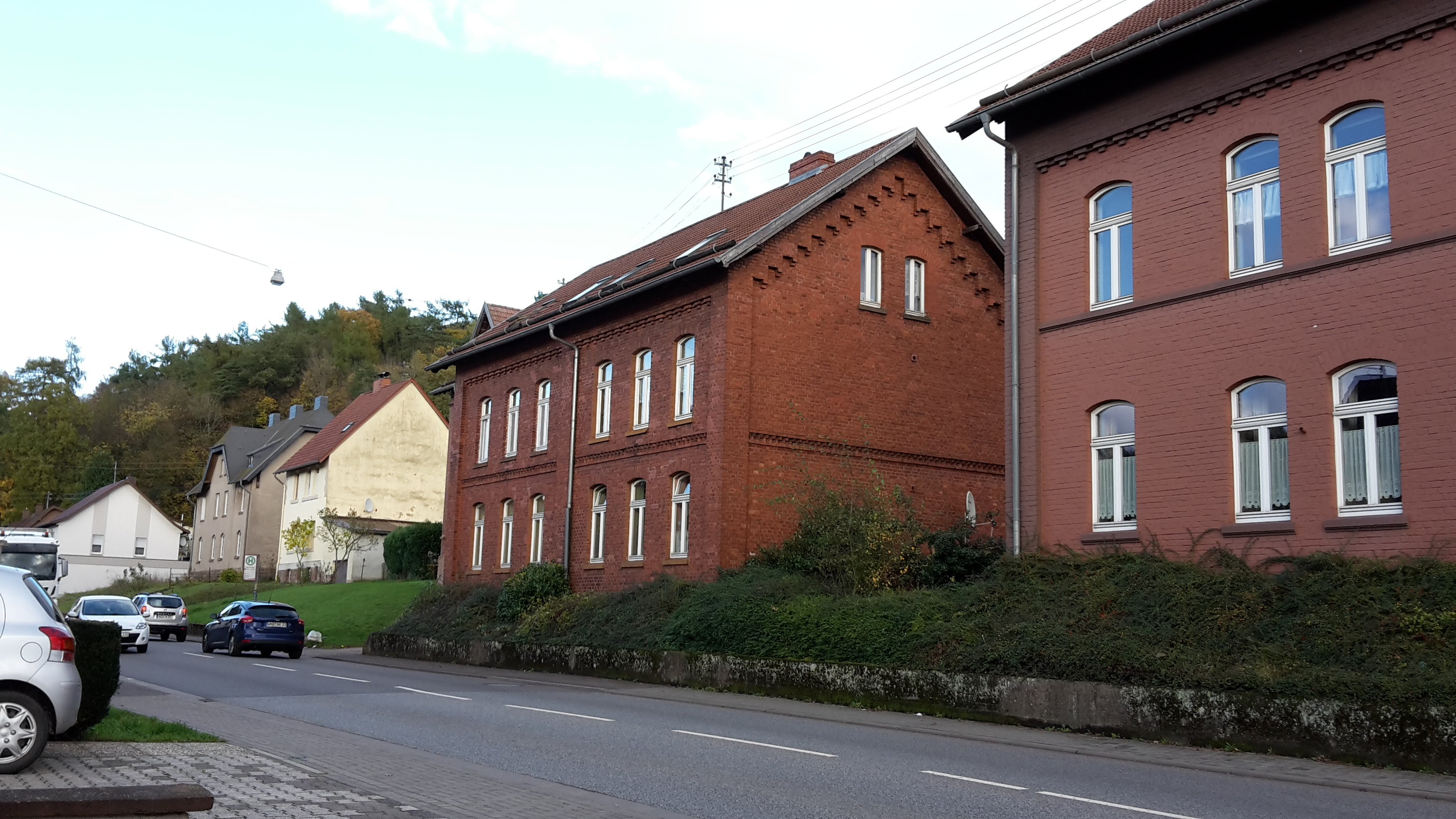 zwei Wohnhäuser des Waderner Bahnhofs in der Bahnhofsstraße